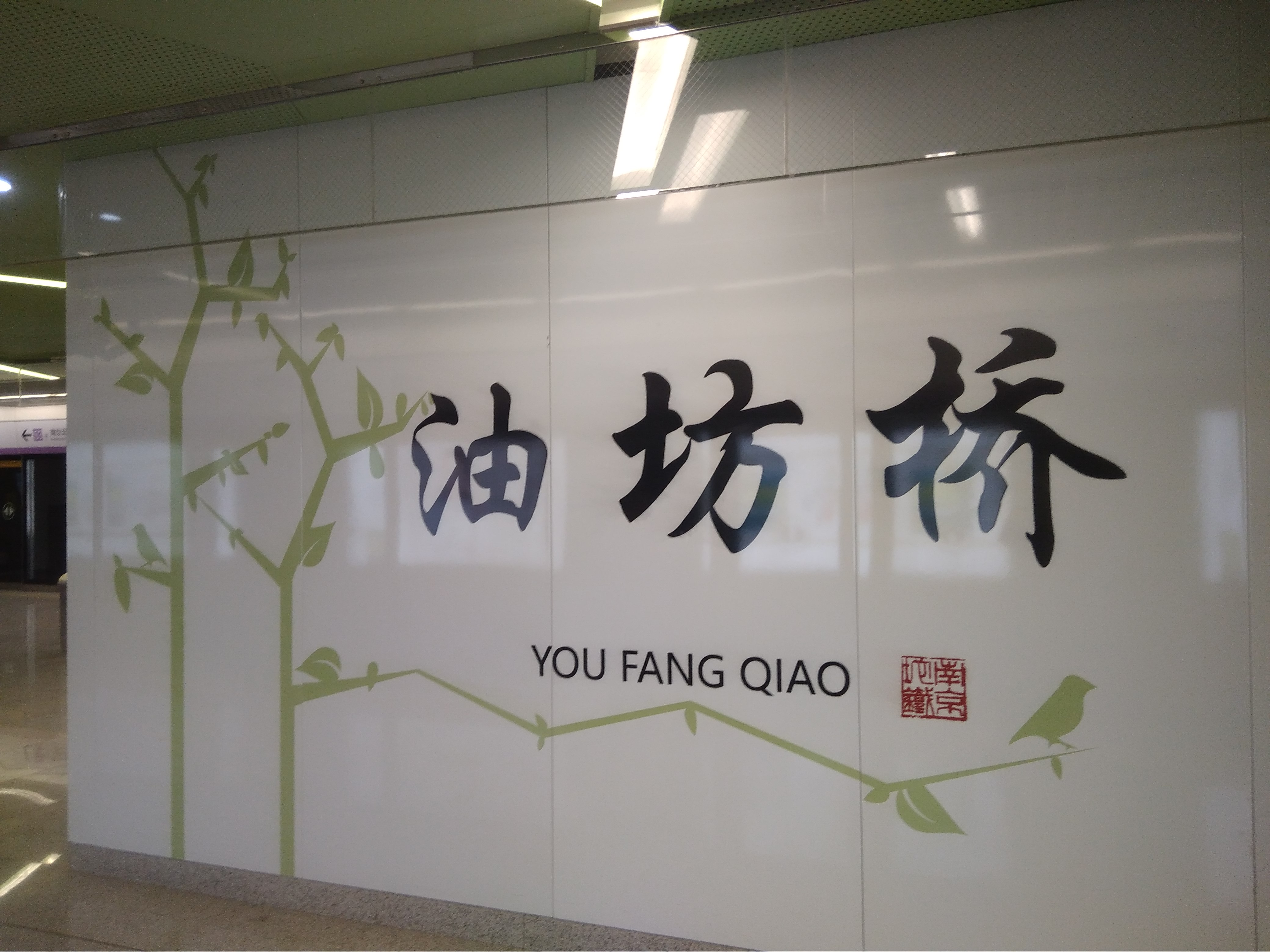 南京地铁S3号线油坊桥站